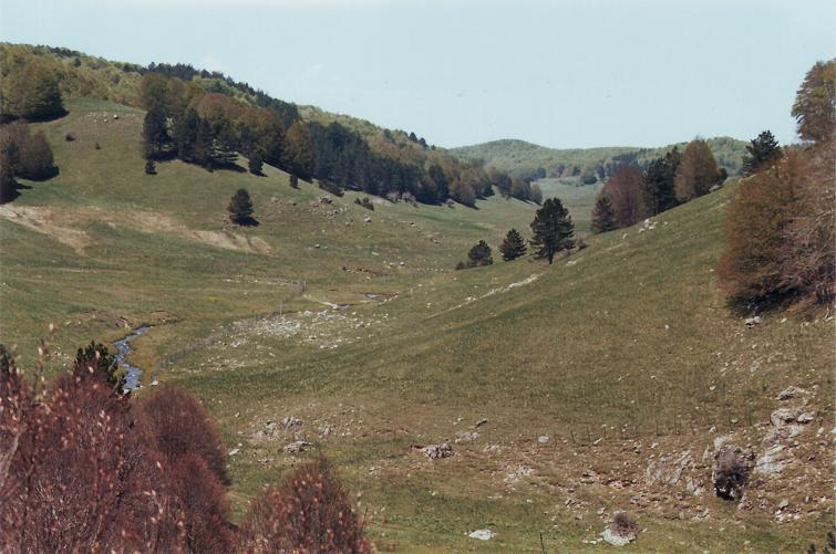 Foto di Bruno Francesco Pileggi